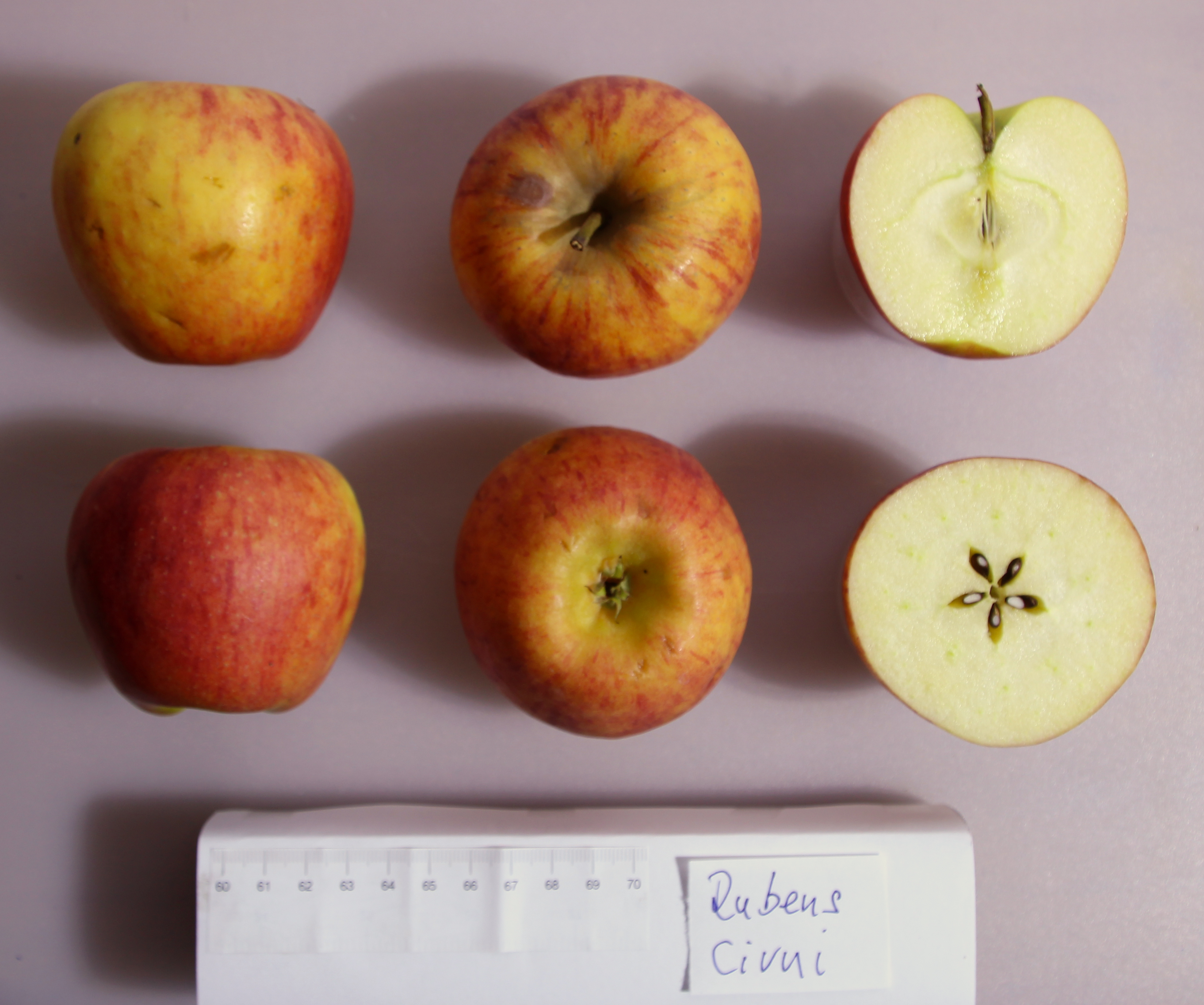 Bildinhalt: Sechs Ansichten von Äpfeln der Sorte Rubens Aufnahmeort: Frankfurt am Main, Deutschland